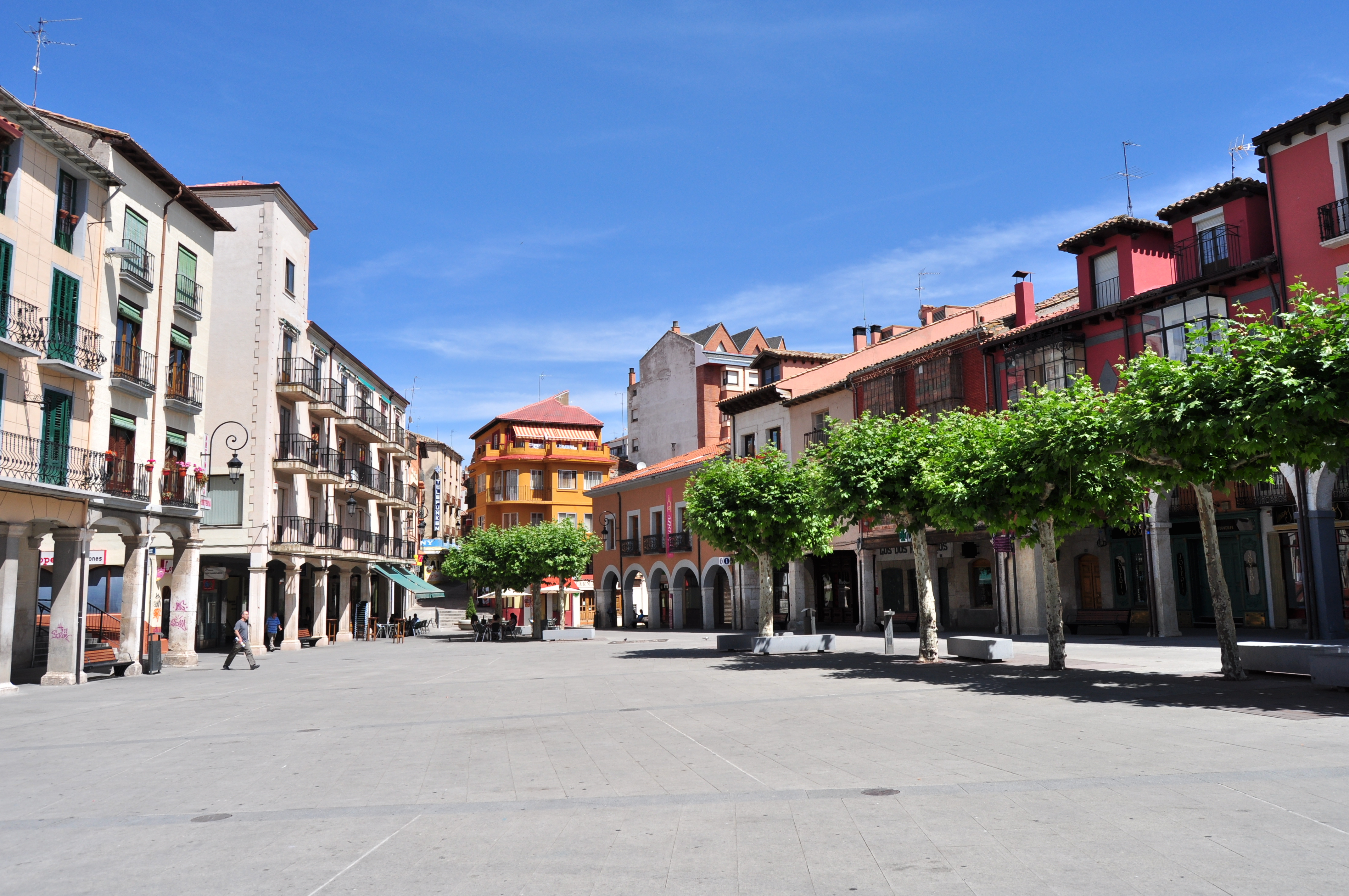 Aranda de Duero - 011